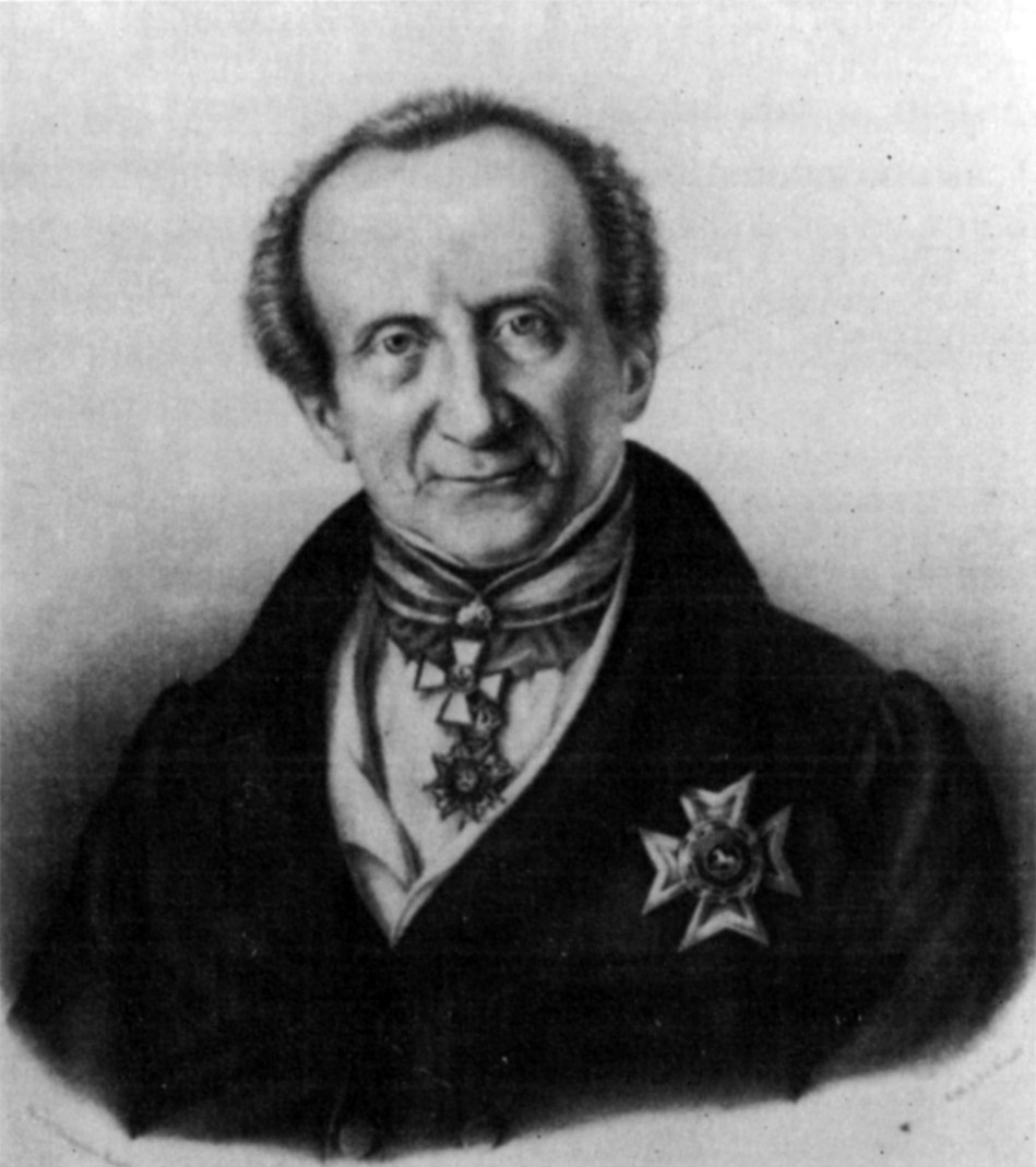 Carl Gottlieb Richter (5.4.1777-3.11.1847).